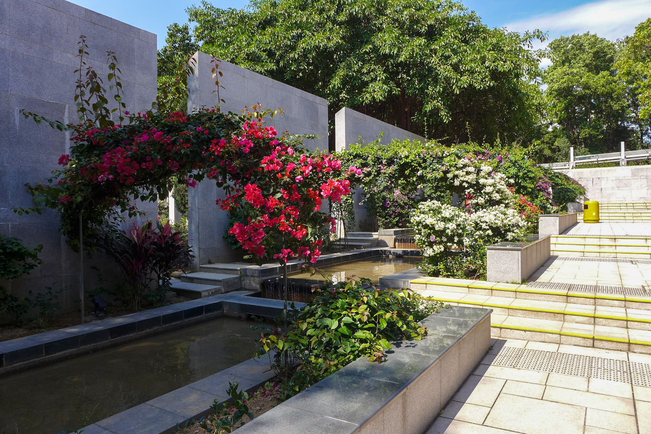 Tai Po Waterfront Park Western Garden Water Feature